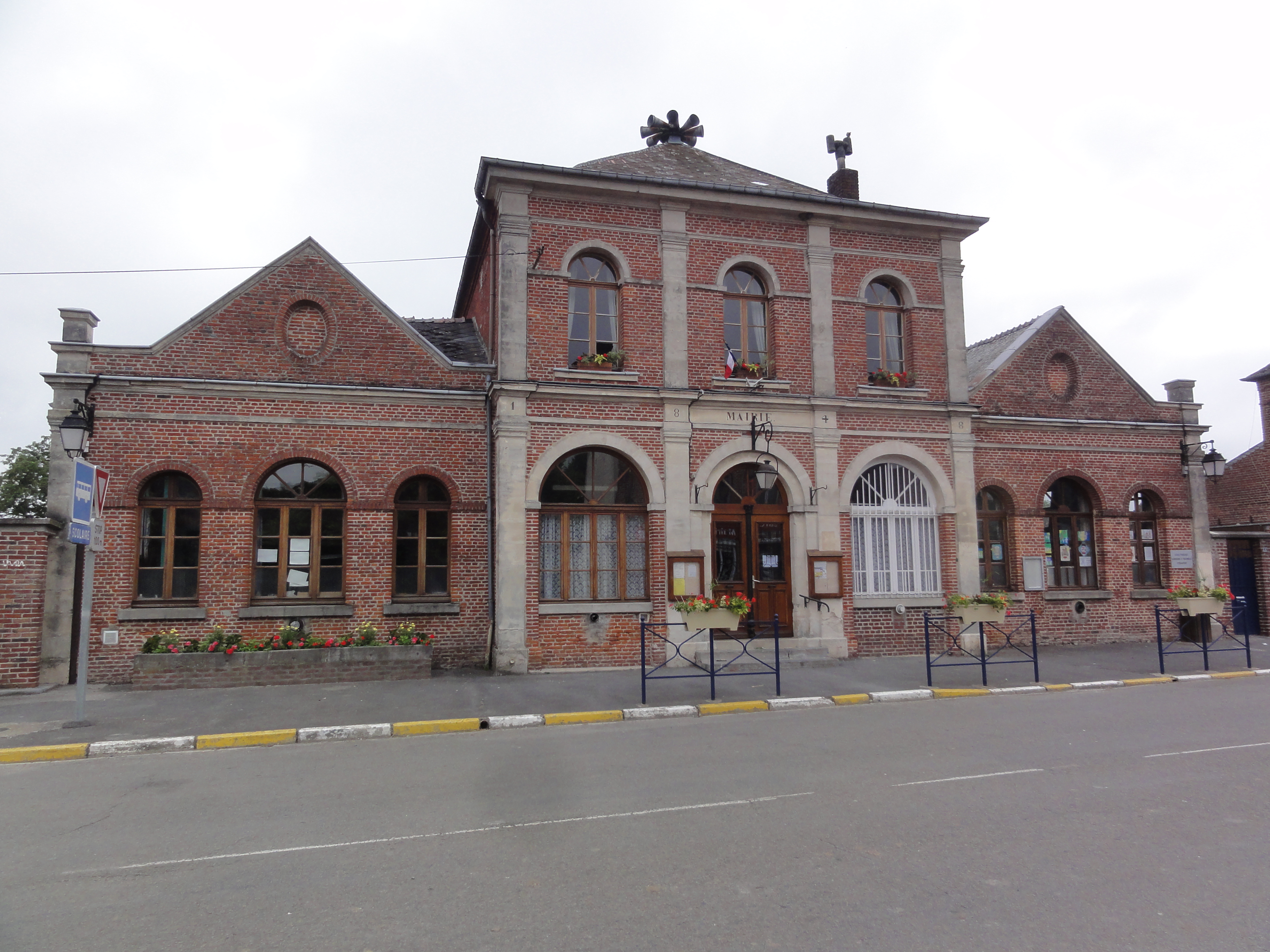 Étréaupont (Aisne) mairie-école